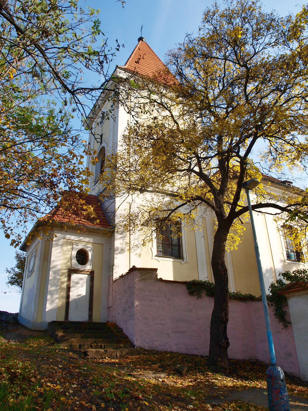 Kostel svatých Filipa a Jakuba na Zlíchově